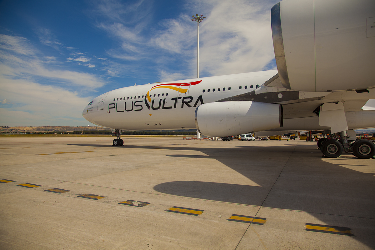 Foto Avión A340 Plus Ultra